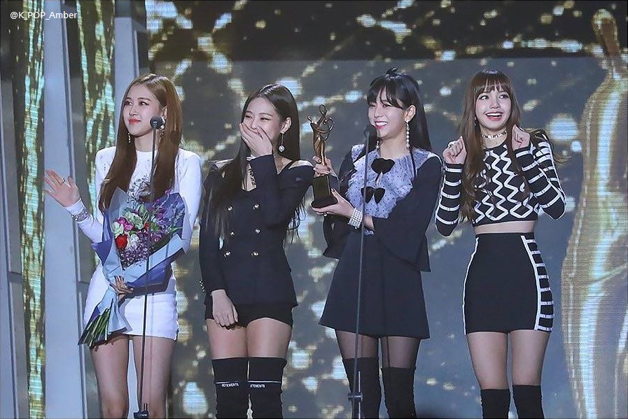 서울가요대상 - 블랙핑크